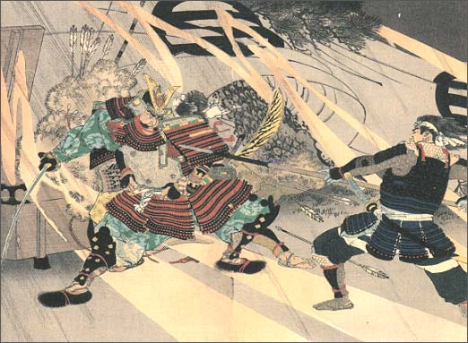 梧斎年英筆「今川義元 桶狭間大合戰之圖」、3枚揃錦絵、豊明市立図書館所蔵。